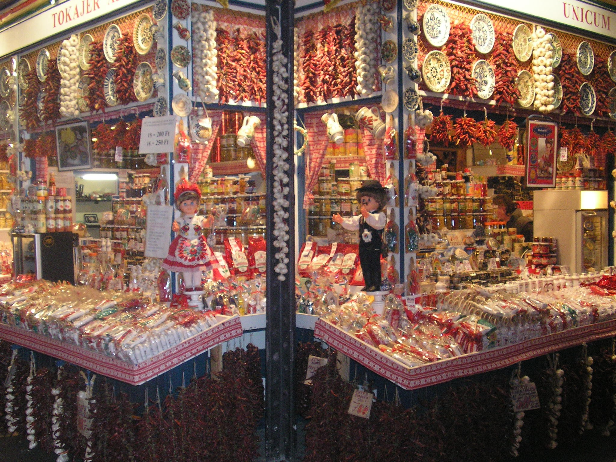 paprika sales stands in Grand Market Hall, Budapest